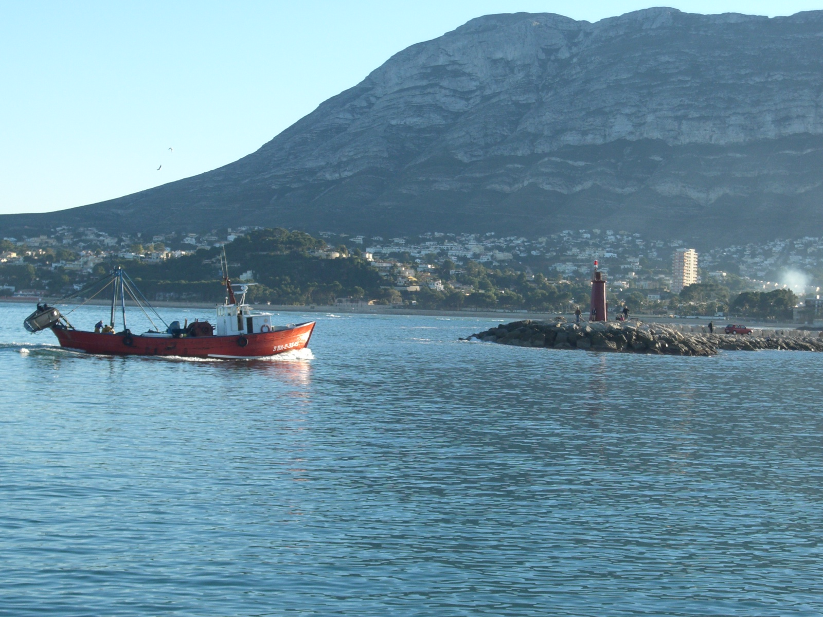 Puerto de Denia Boat entering the port in Denia (Alicante)